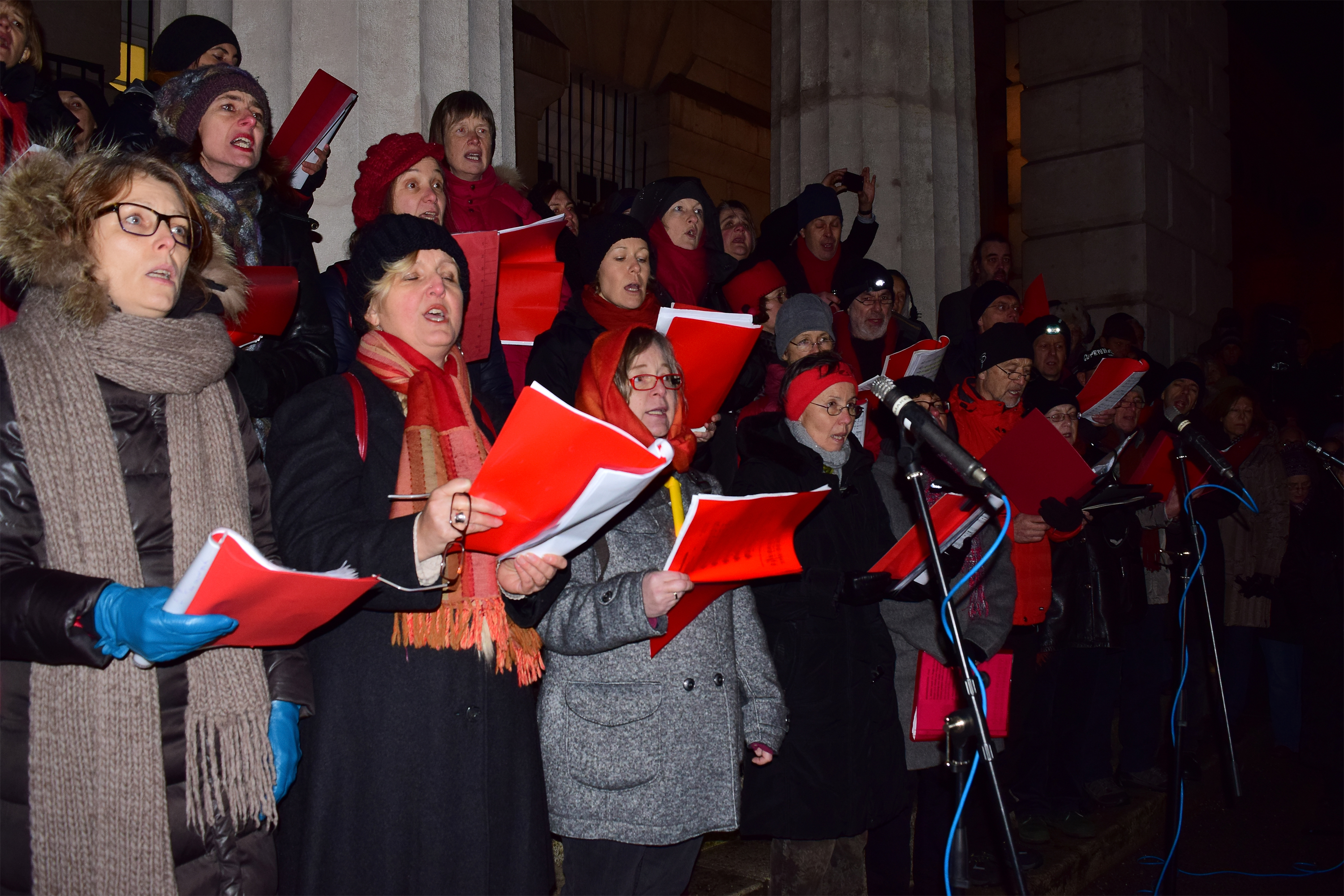 Gedenkkundgebung 70 Jahre Befreiung von Auschwitz am 27. Jänner 2015, dem Internationalen Holocaust-Gedenktag. Am Bild ist der Chor beim Singen des Dachaulieds zu sehen.